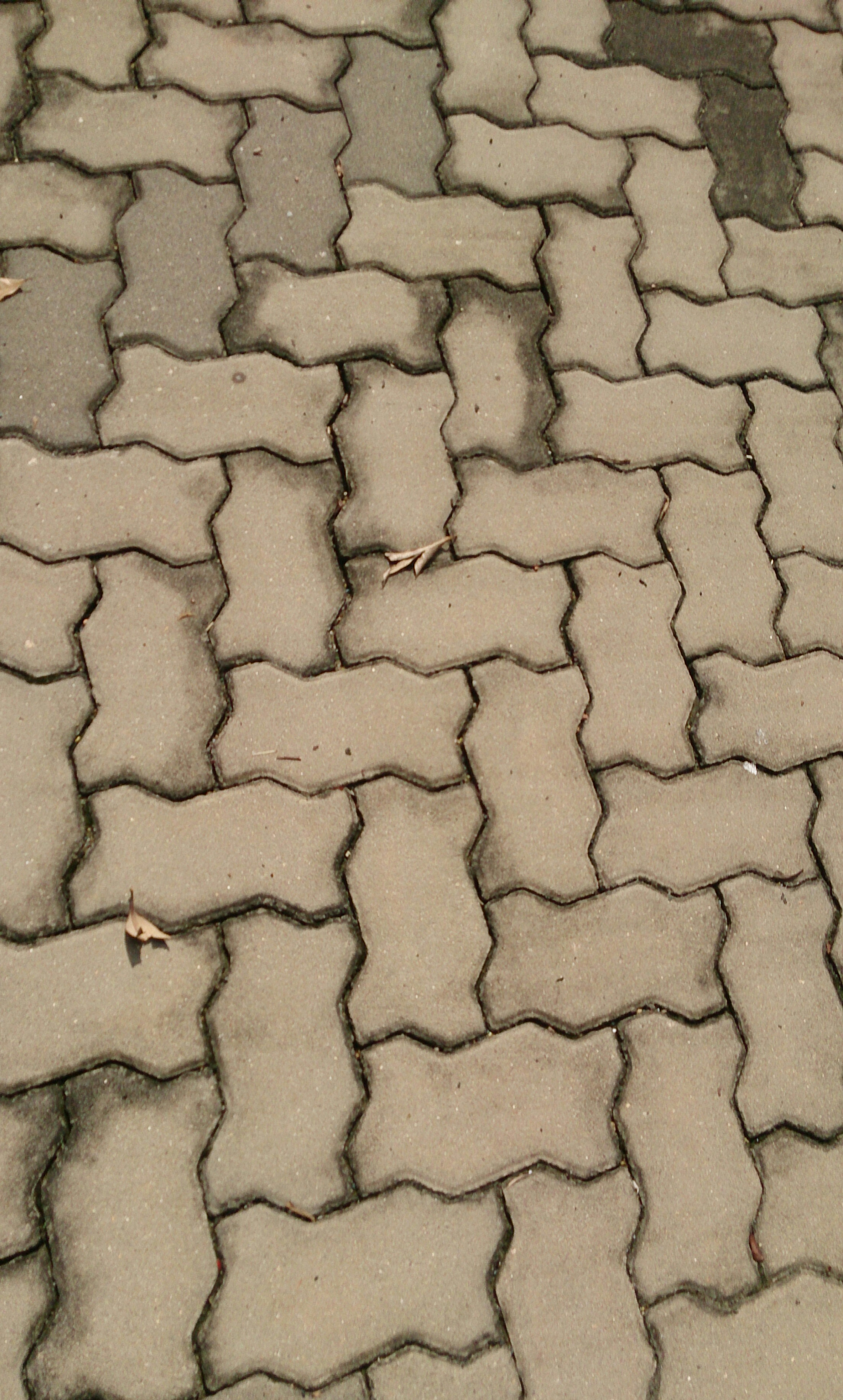 nice